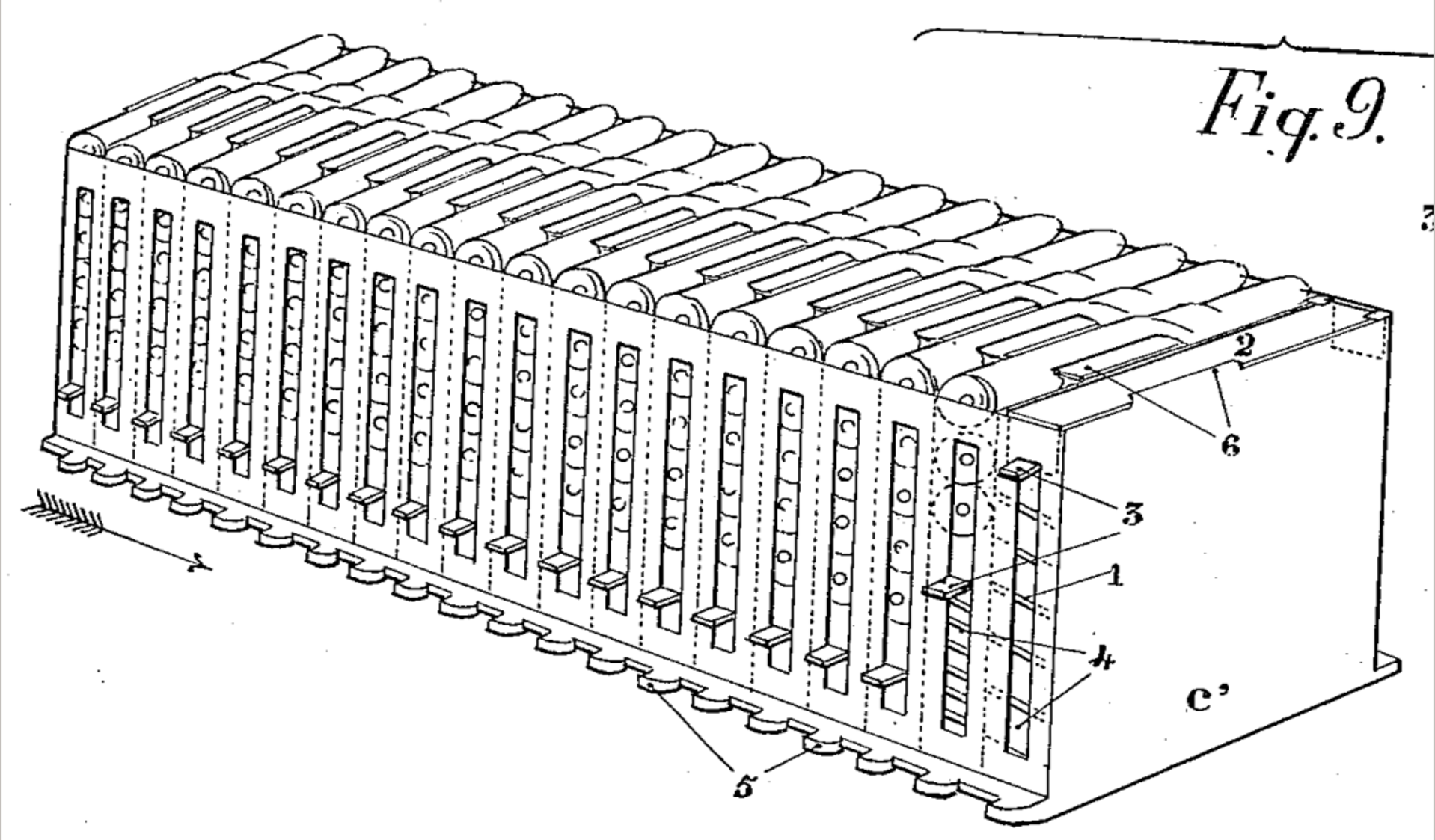 100-strelni nabojnik za italijansko strojnico Fiat-Revelli M1914.